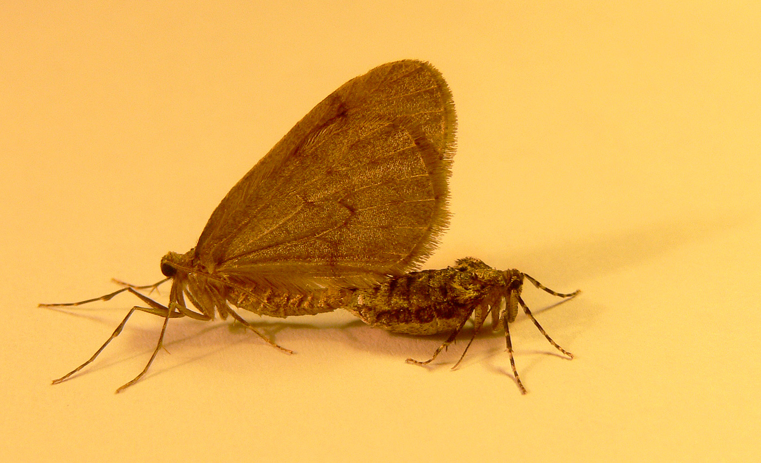 Operophtera brumata L. ou phalène brumeuse ou cheimatobie ou ou "Cheimatobie hiemale" ou phalène hiémale ou petite phalène hiémale ou arpenteuse tardive est un papillon de nuit de la vaste famille des Geometridae. Cette espèce des régions tempérées vit sur les arbres forestiers, les vergers ou dans les jardins. Elle n’est active que la nuit et au crépusculaire. Elle était très abondante en Europe et Europe de l'est jusqu’au 19ème siècle, et elle reste relativement courante dans les environnement très arborés. Comme Erannis defoliaria ("Hibernie défoliante"), autre espèce dont les chenilles défolient les arbres, c’est un des très rares lépidoptères dont les adultes se cherchent et se reproduisent en plein hiver, d'Octobre à Février, lorsque les températures sont toutefois au dessus de 5°C (et plutôt entre 10 et 15°C pour la copulation, que l’on observe souvent sur des arbres ou un mur éclairé par un lampadaire, ce papillon étant attiré par la lumière artificielle). source : F. Lamiot (own work)